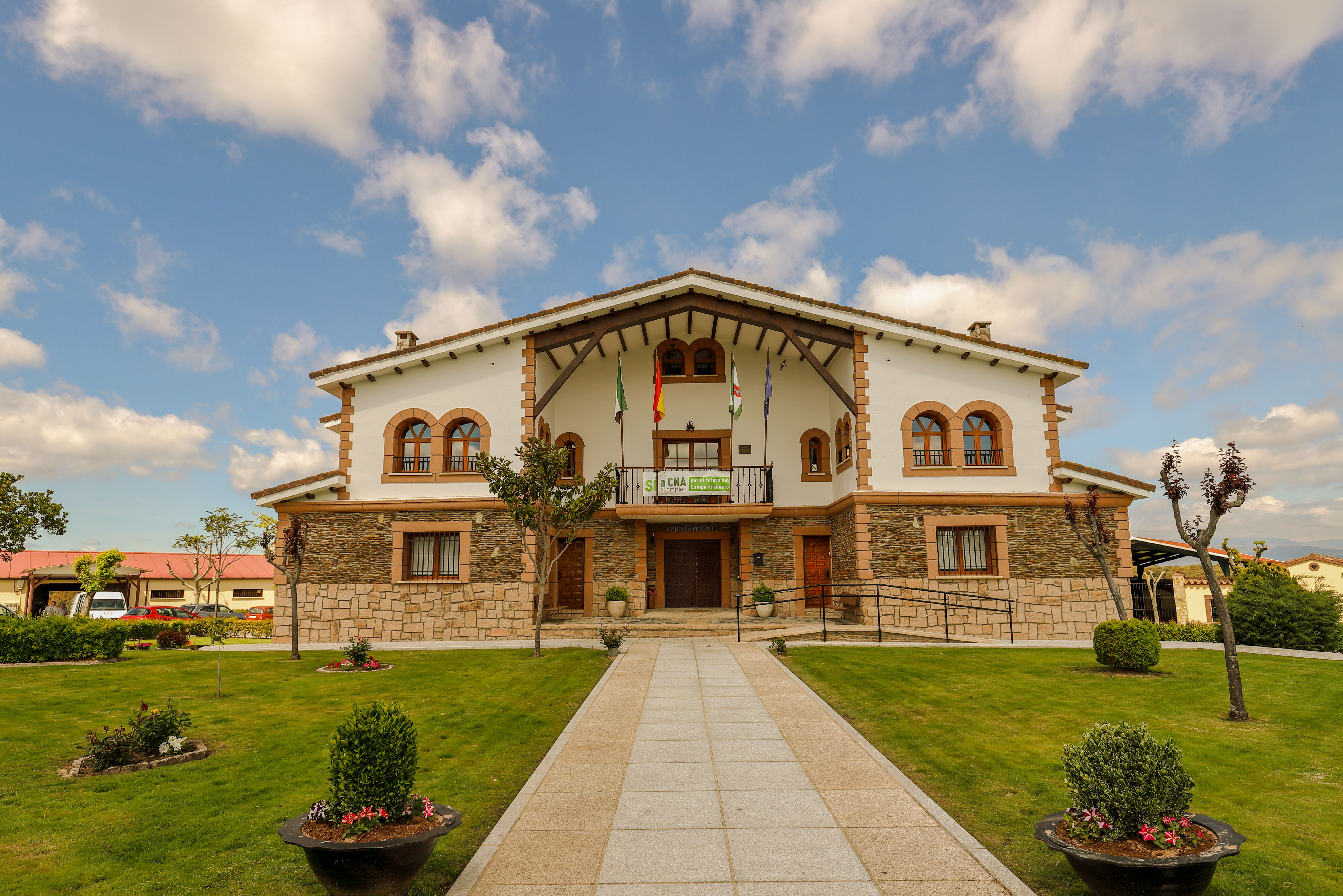 Toril es un municipio de la comarca Campo Arañuelo, en la provincia de Cáceres.